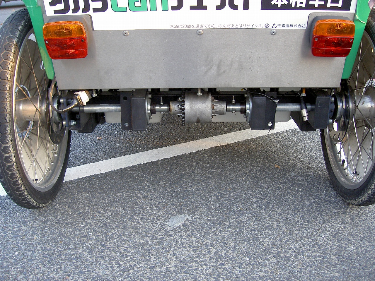 VELOTAXI rear